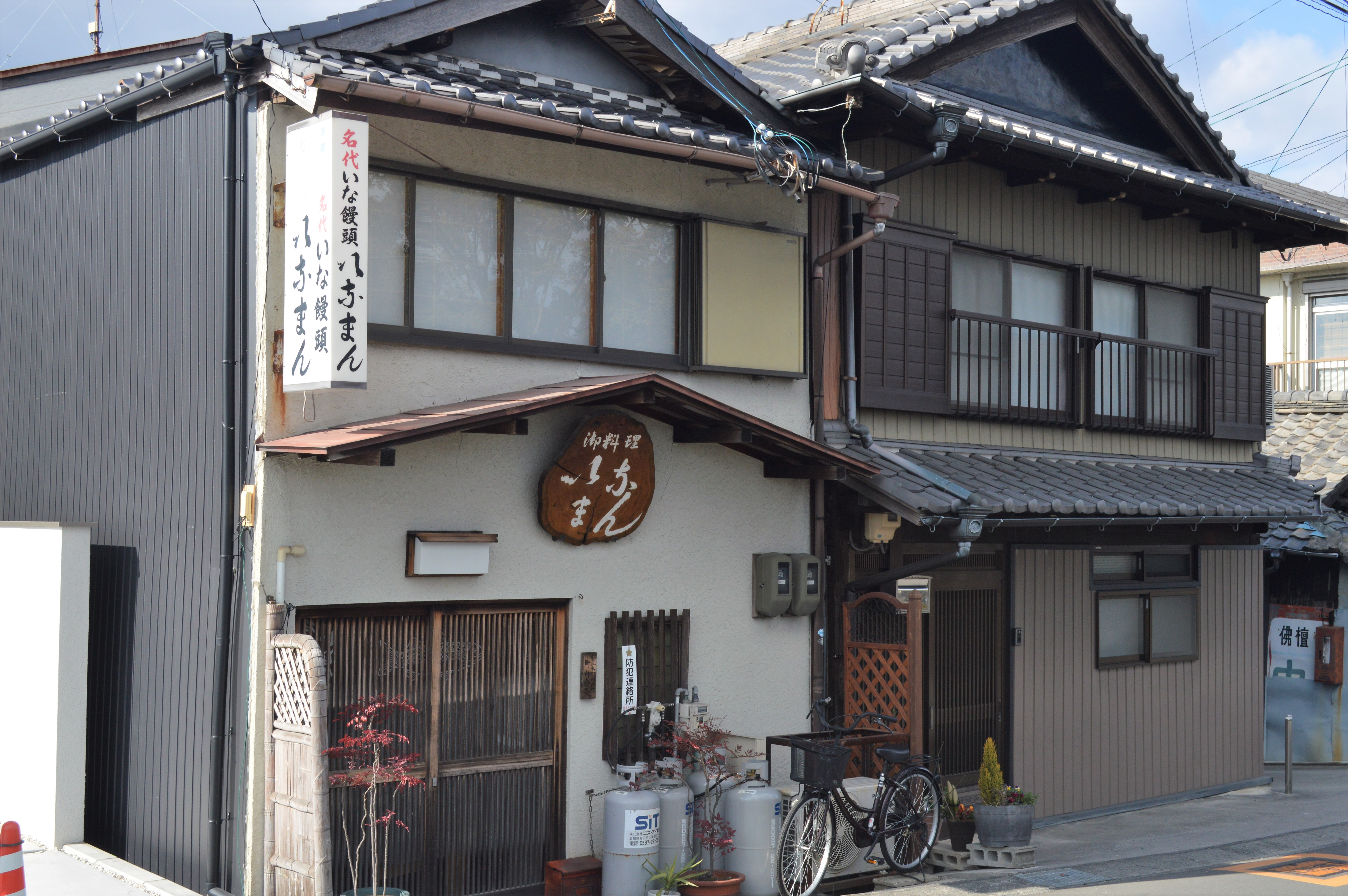 愛知県海部郡蟹江町の料理屋「いなまん」。同名（いなまん）の郷土料理の店。